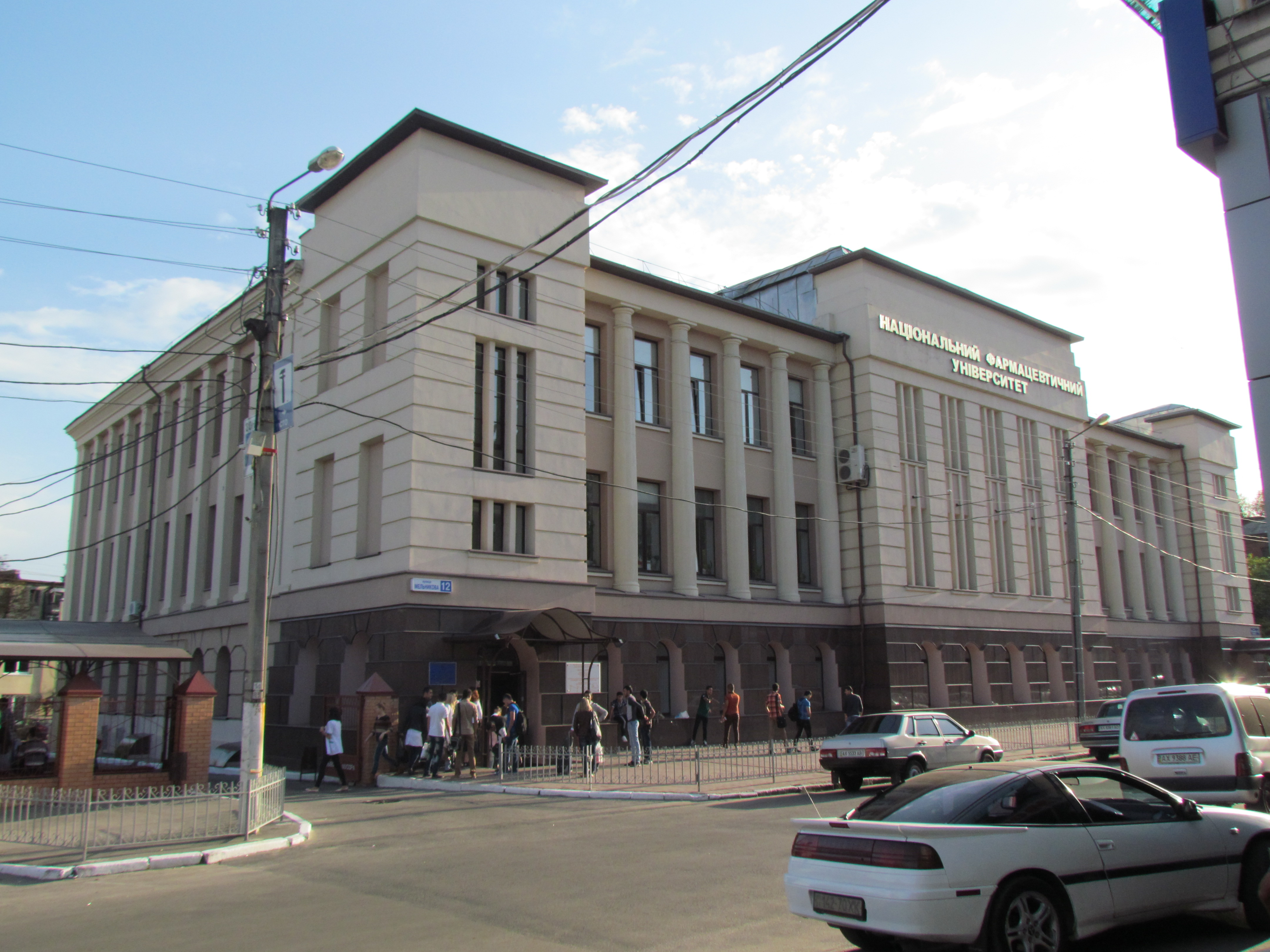 Україна, Харків, вул. Мельникова, 12 Харківський Національний Фармацевтичний Університет